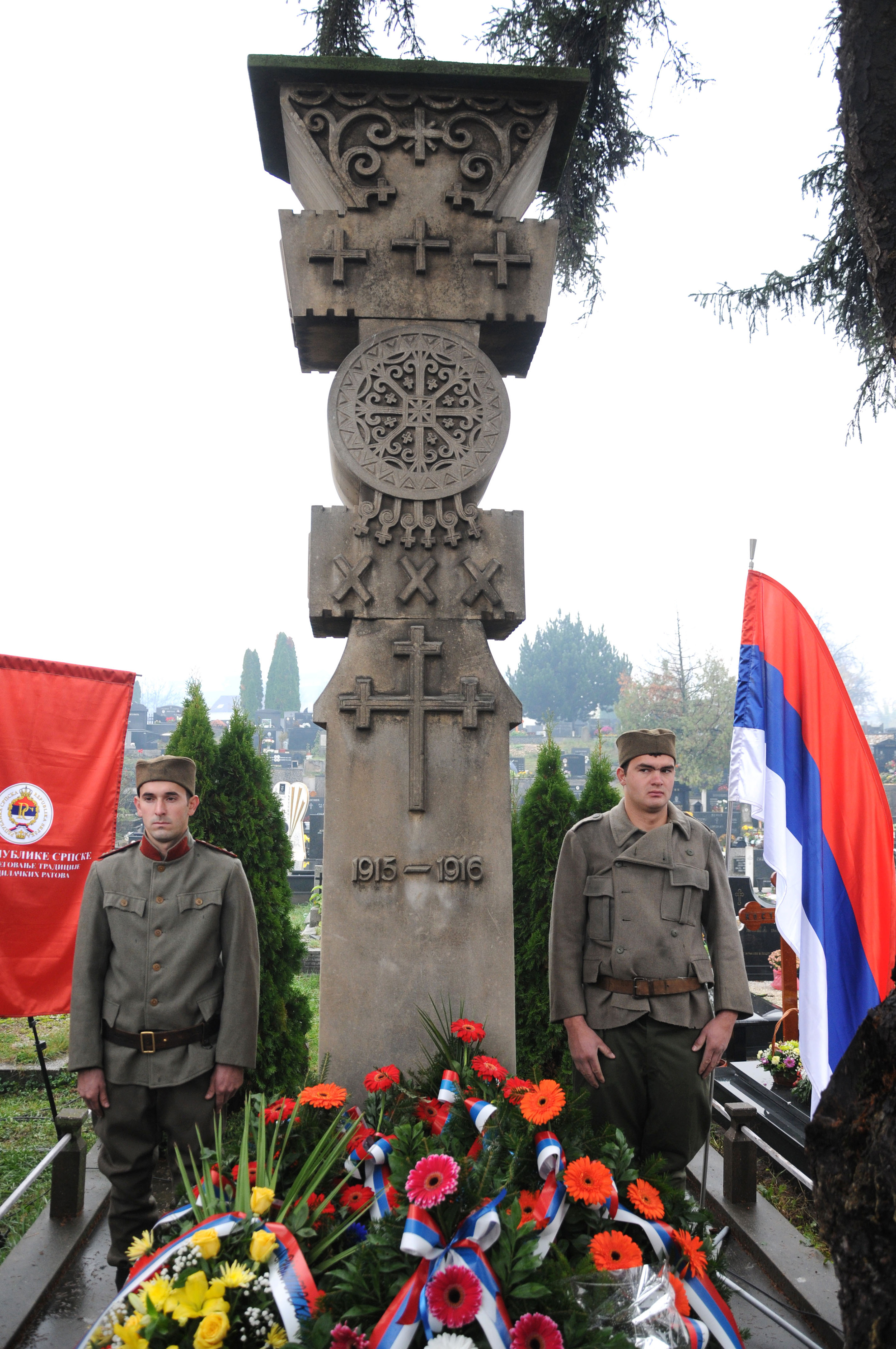 Spomenik zrtvama veleizdajnickog procesa,Banja Luka groblje sveti pantelija This image was uploaded as part of Trace of Soul 2015.